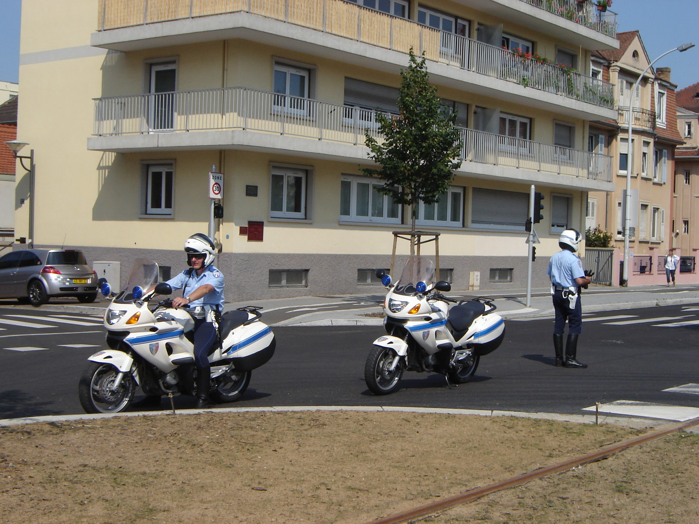 Motos de la Police Municipale de Strasbourg